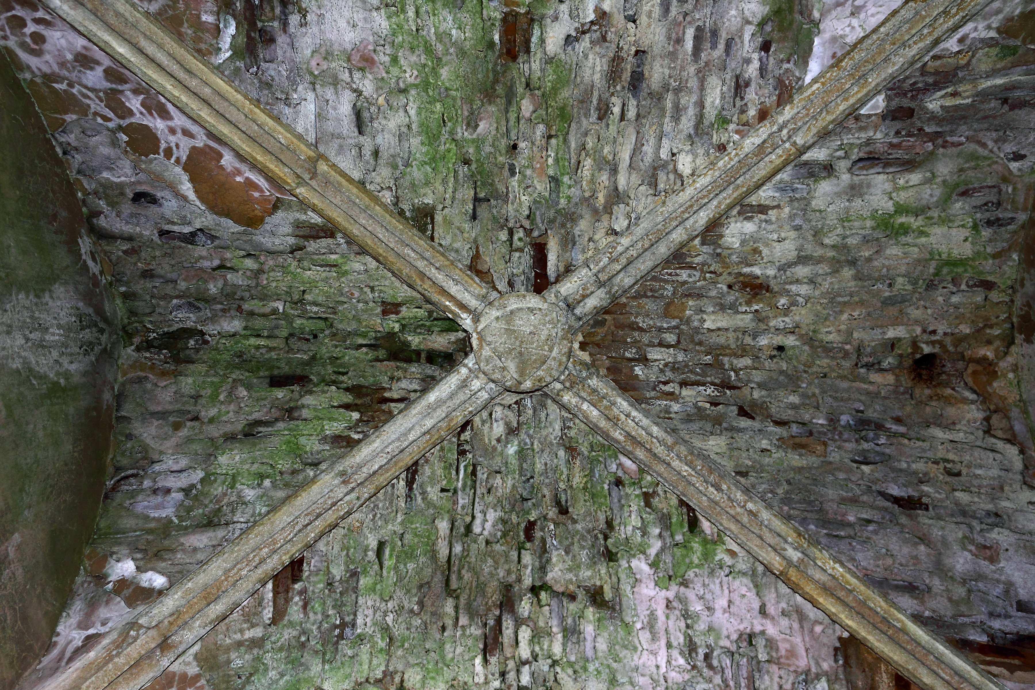 Burgruine Kronsegg aus dem 13. bis 15. Jahrhundert